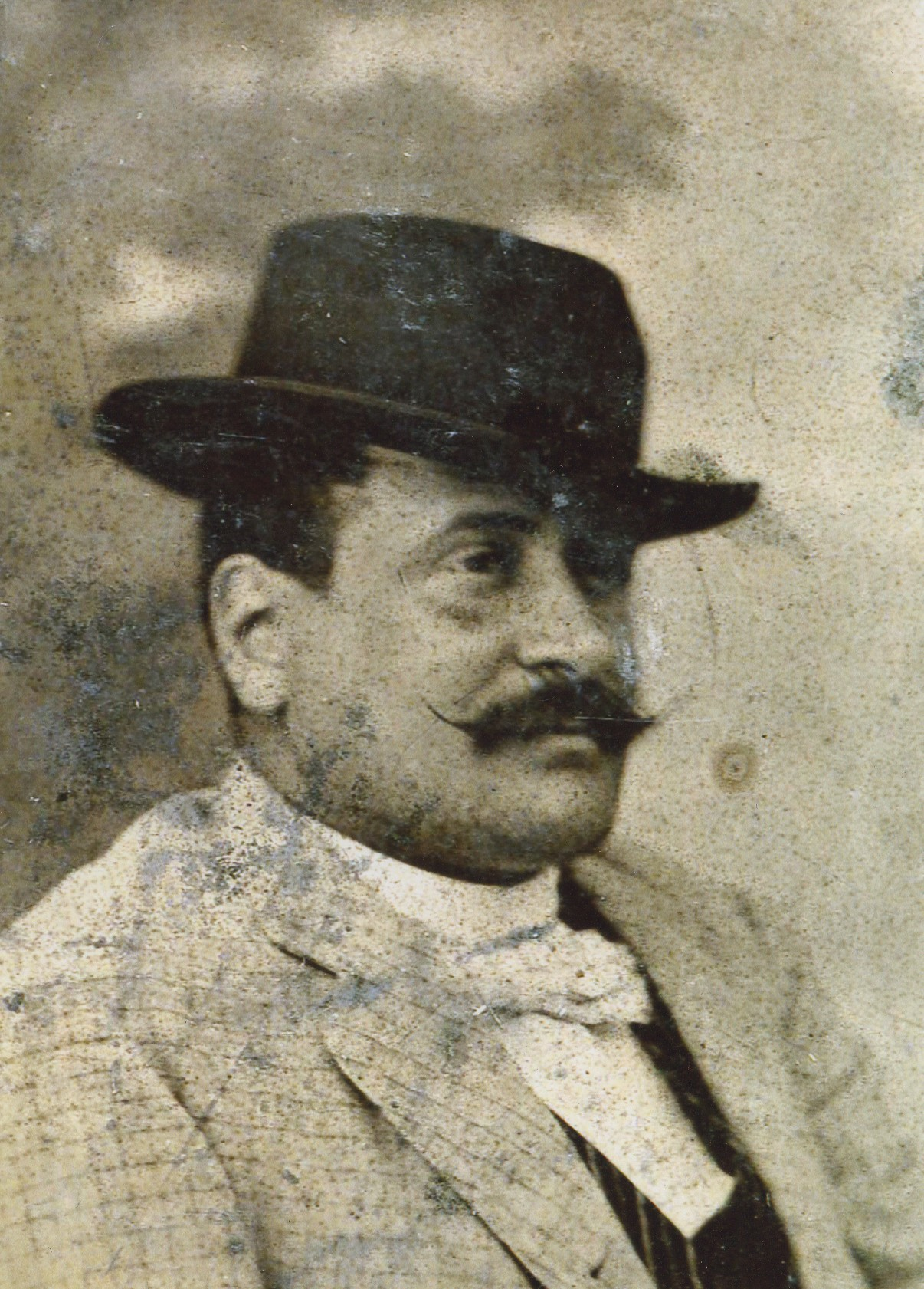 Gaetano Pasqui